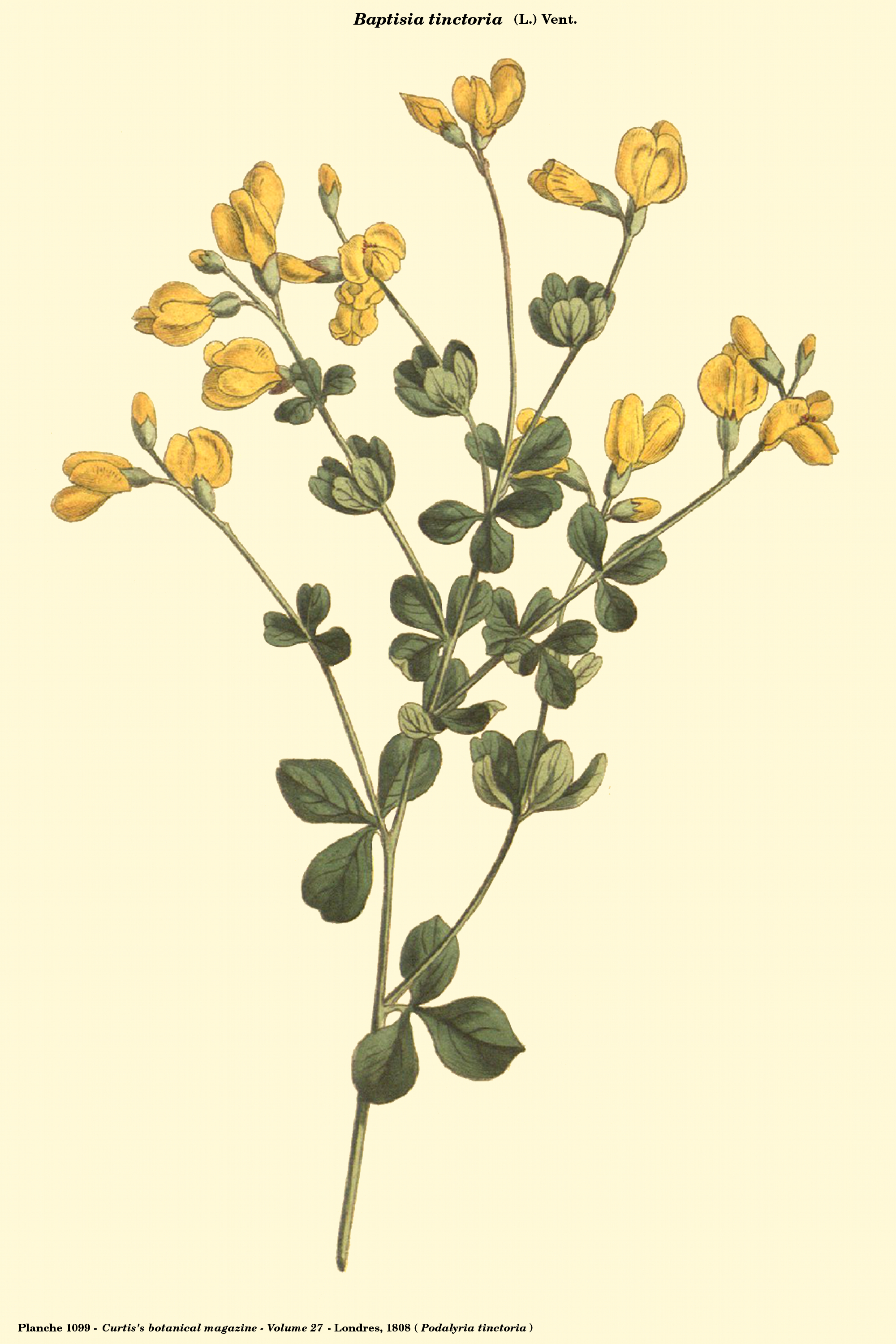 Baptisia tinctoria - Planche 1099 du Curtis's botanical magazine - Volume 27 - Londres, 1808 - Planche reprise sous Gimp par D. Prévôt